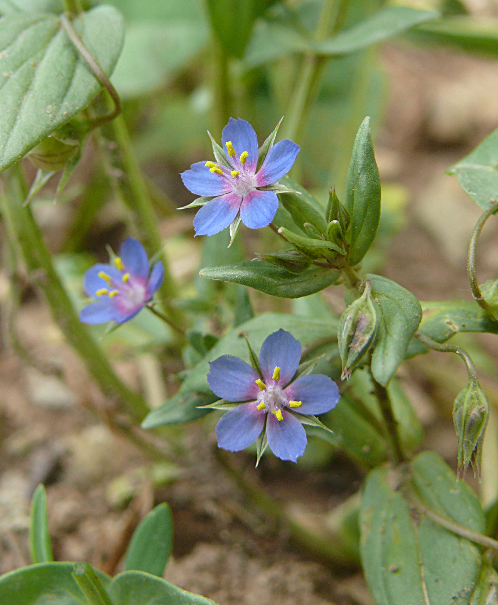 Anagallis foemina, Mainfranken, Deutschland